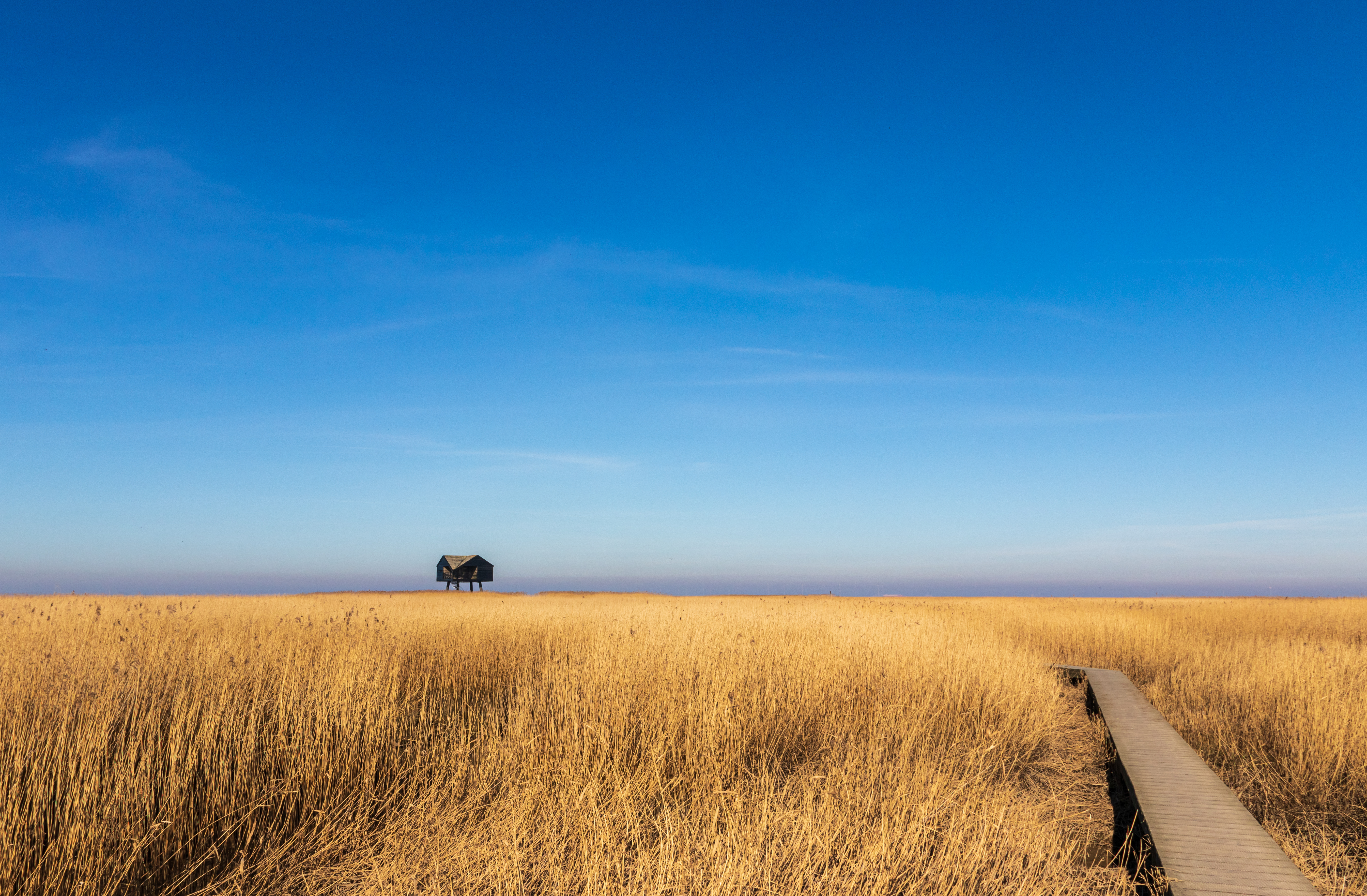 Der Kiekkaaste in Nieuwe Statenzijl, Niederlande